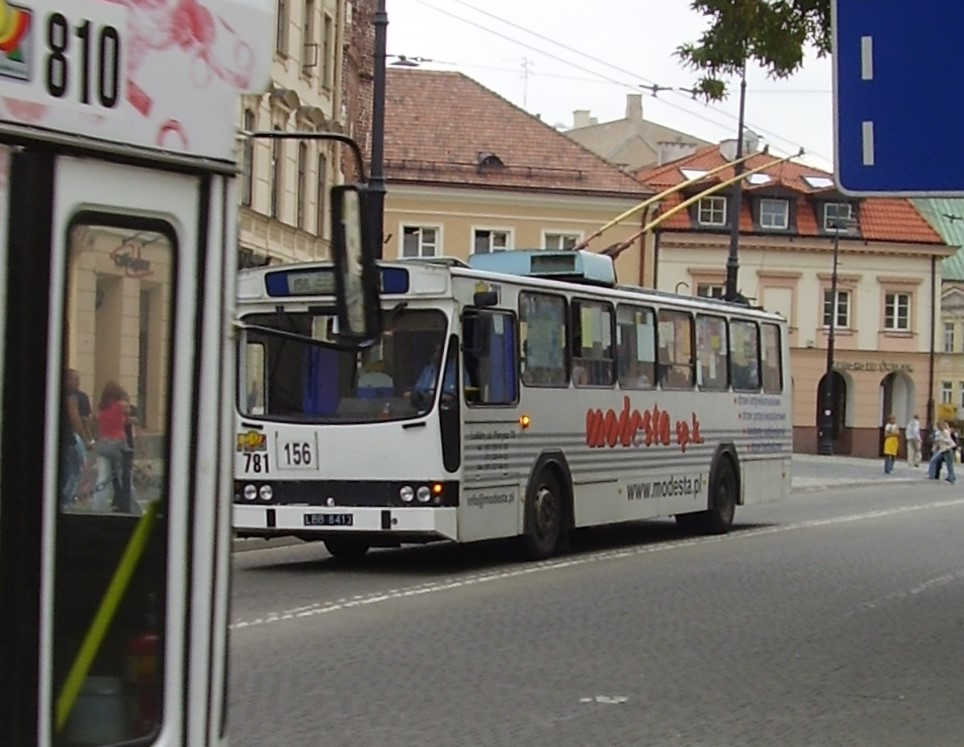 Trolejbus Jelcz PR110T wyprodukowany przez firmę KPNA ze Słupska w 1991 roku.